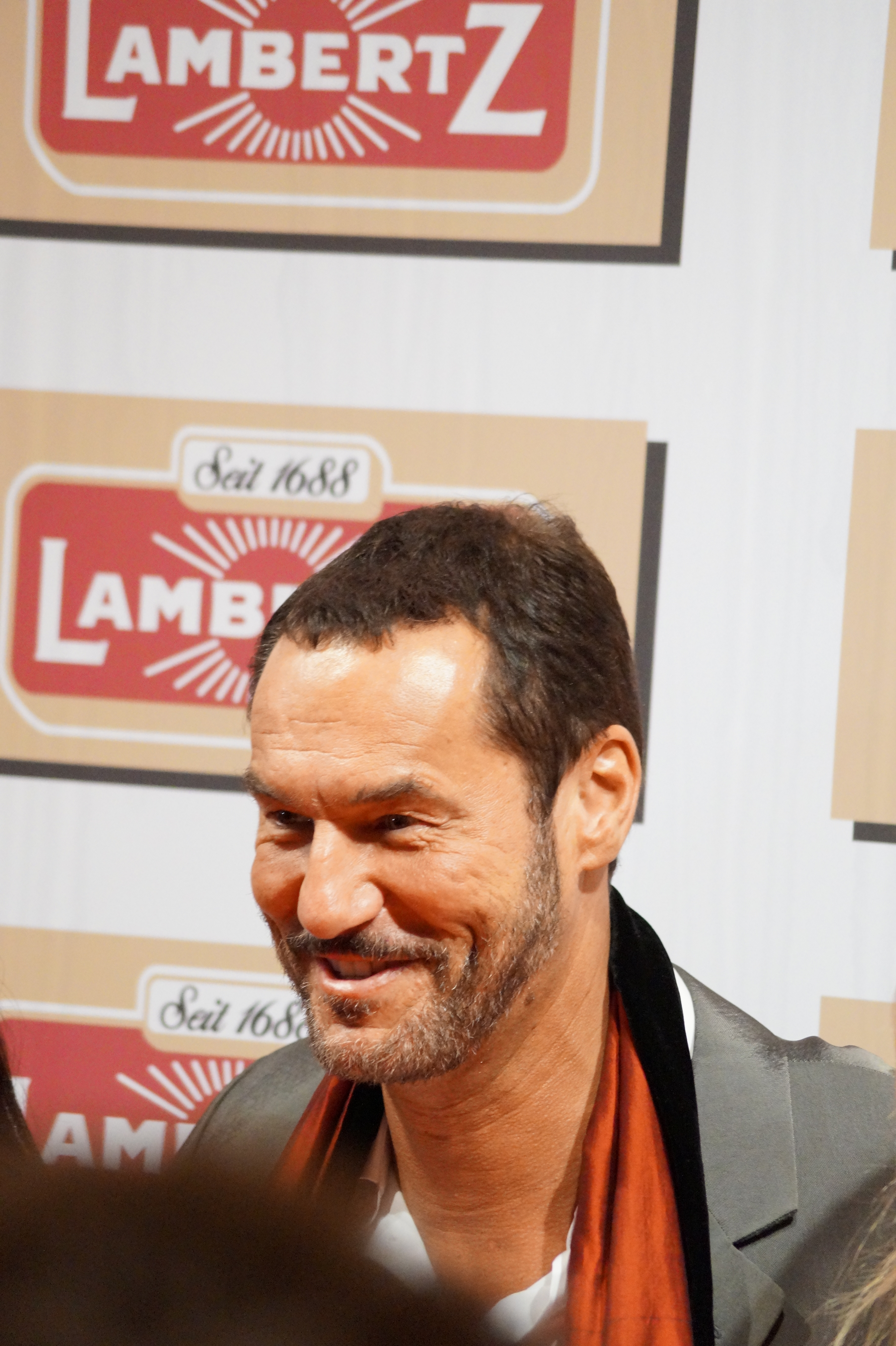 "Lambertz Monday Night 2015" im "Alten Wartesaal" in Köln, am 02.02.2015.